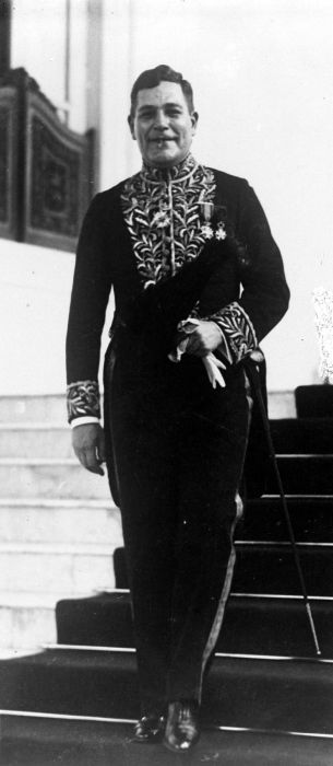 Repronegatief. Portret van Prof. Dr. B.J.O. Schrieke